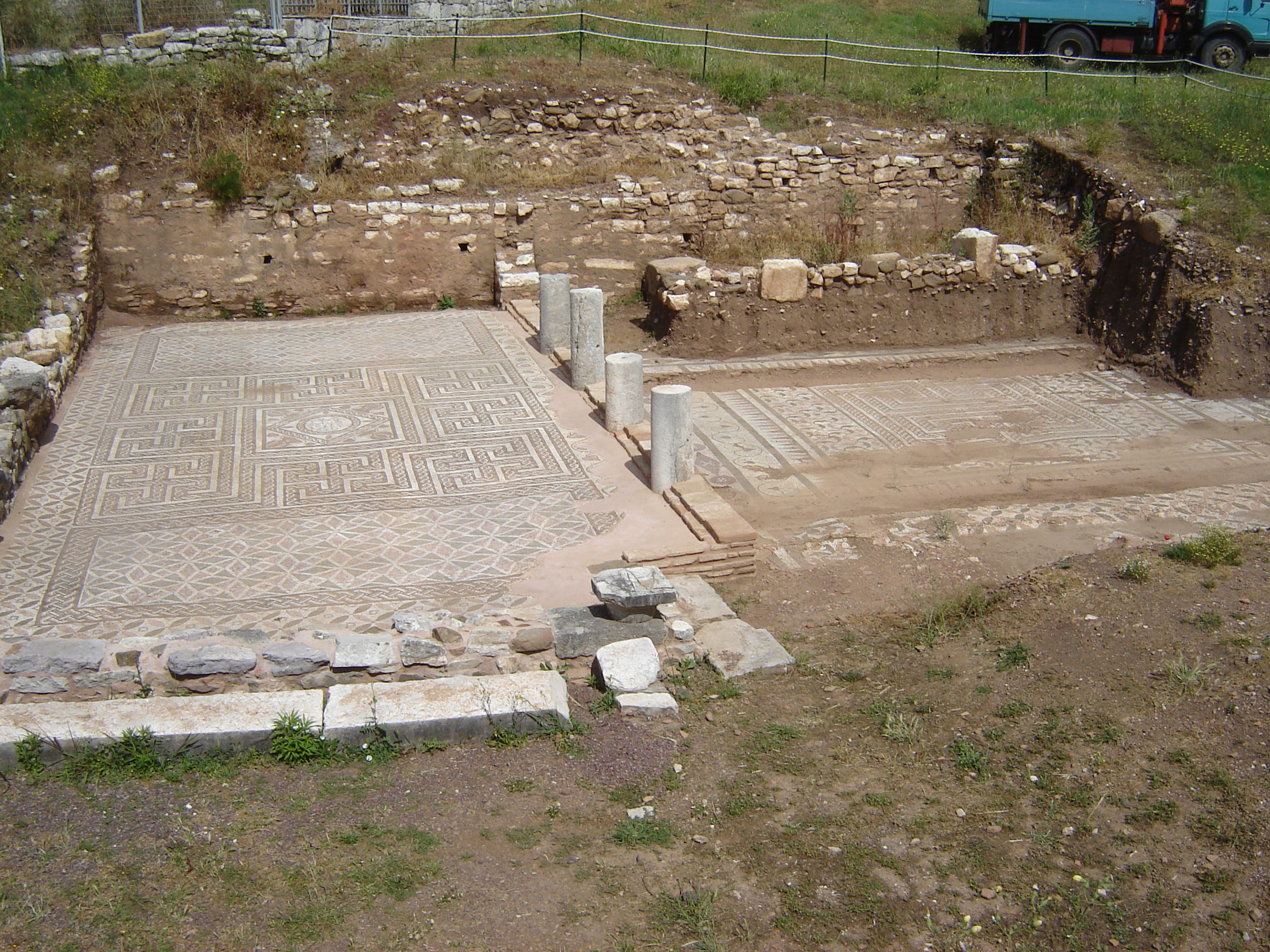 Αρχαία Μεσσήνη - Αρχαιολογικός Χώρος«Αρχαία Μεσσήνη»